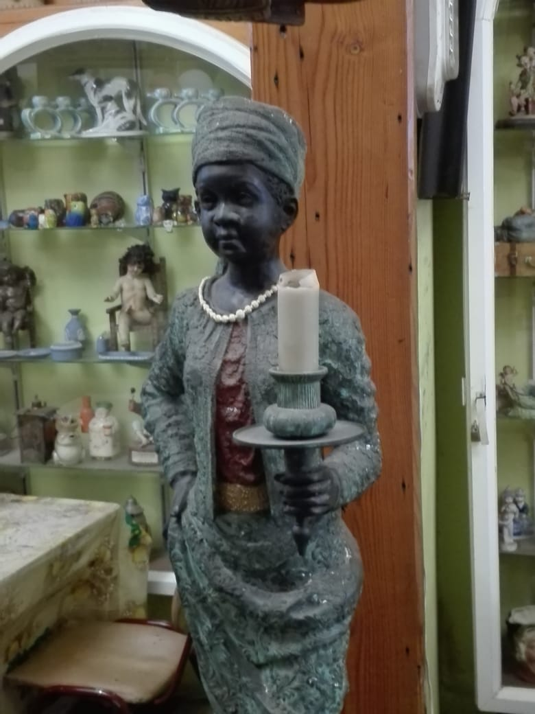 Escultura parte de la decoración del J. Cruz Martínez de calle Freire.